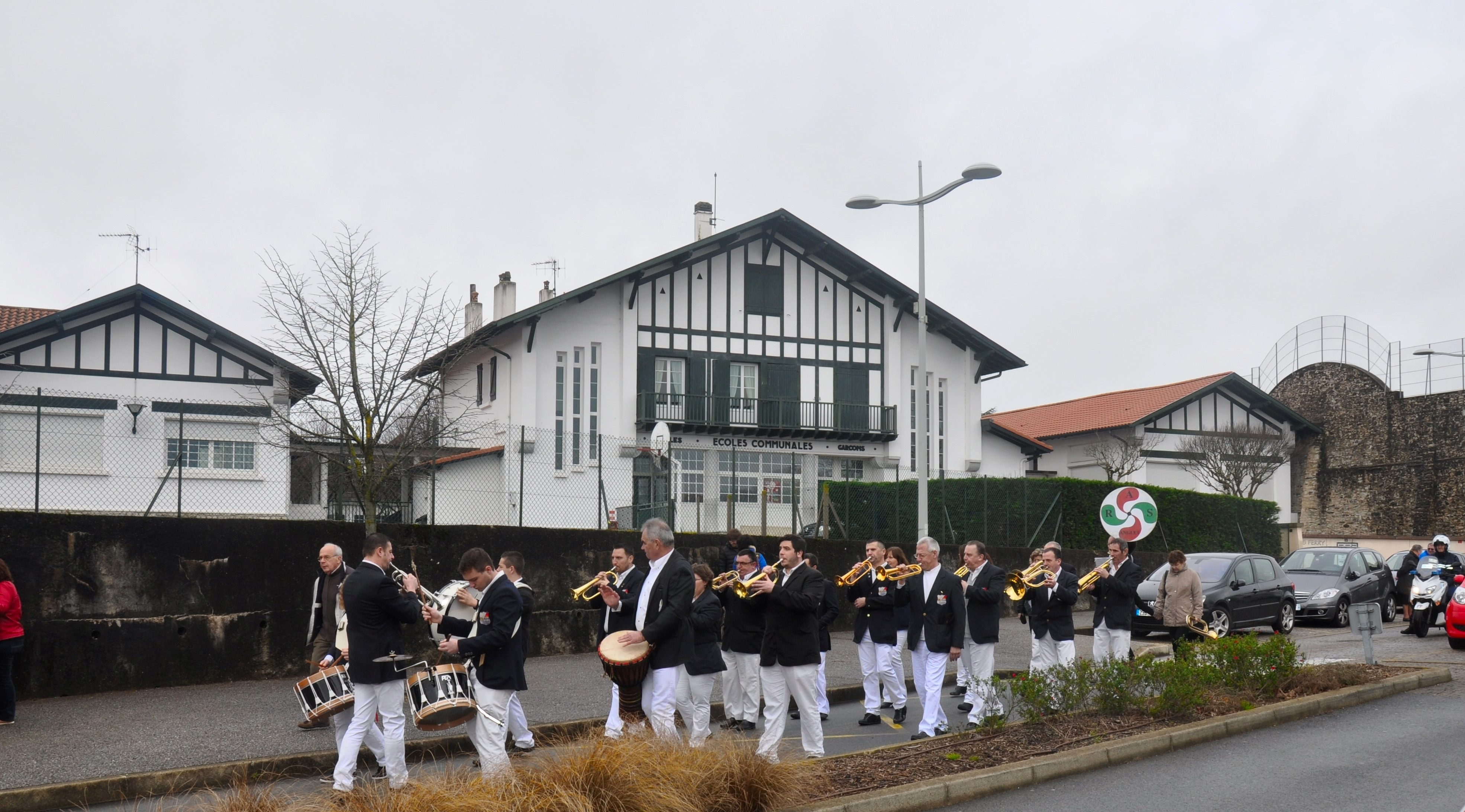 Ecole Anglet Place Lamothe